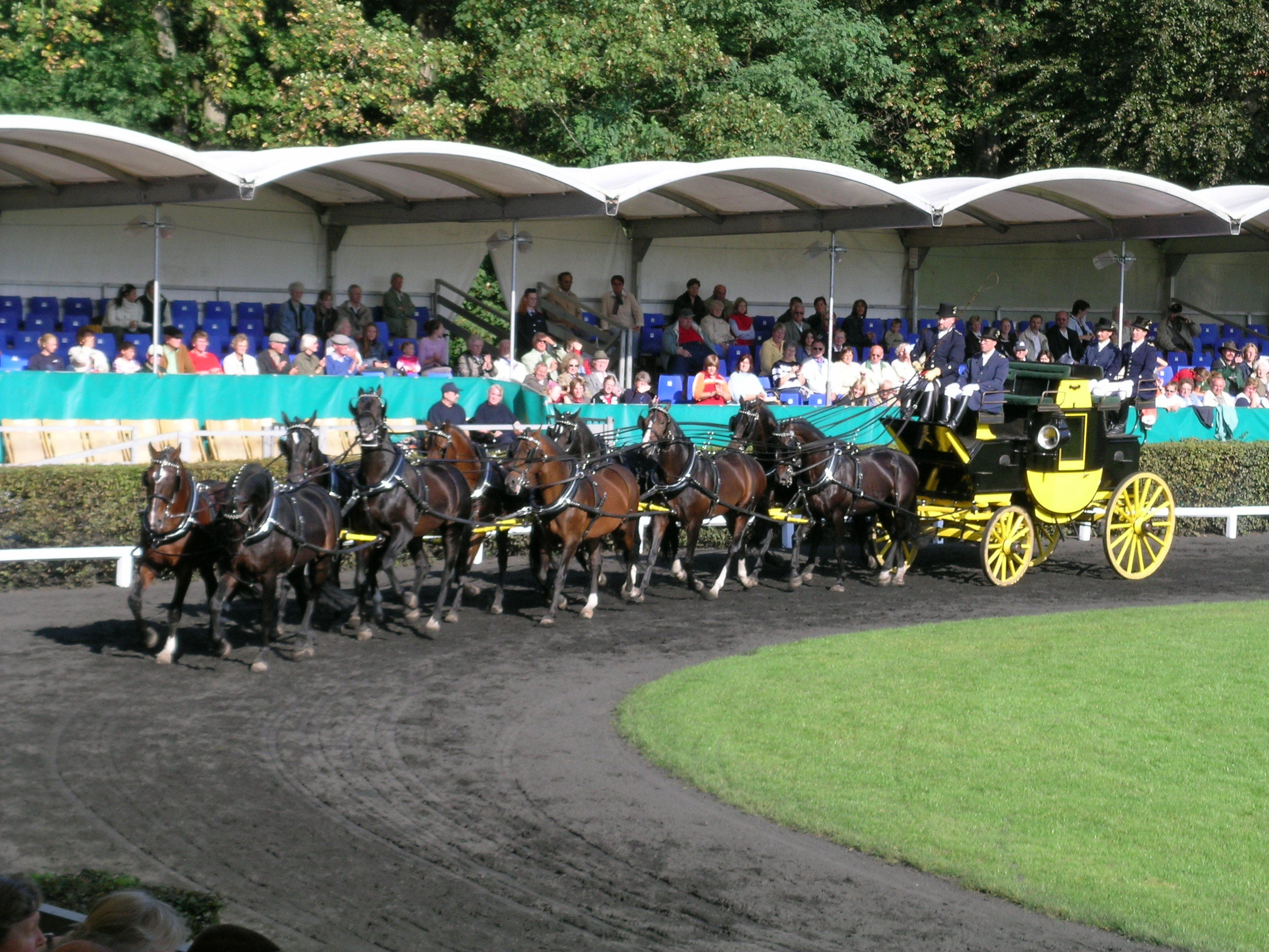 Vorführungen zur Hengstparade im Landgestüt Celle